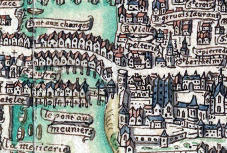 Plan de Paris dit plan de la Tapisserie ou Bonnardot (détail, église St-Barthélémy sur l'Île de la Cité, avec les ponts aux Changes et aux Meuniers sur la Seine)